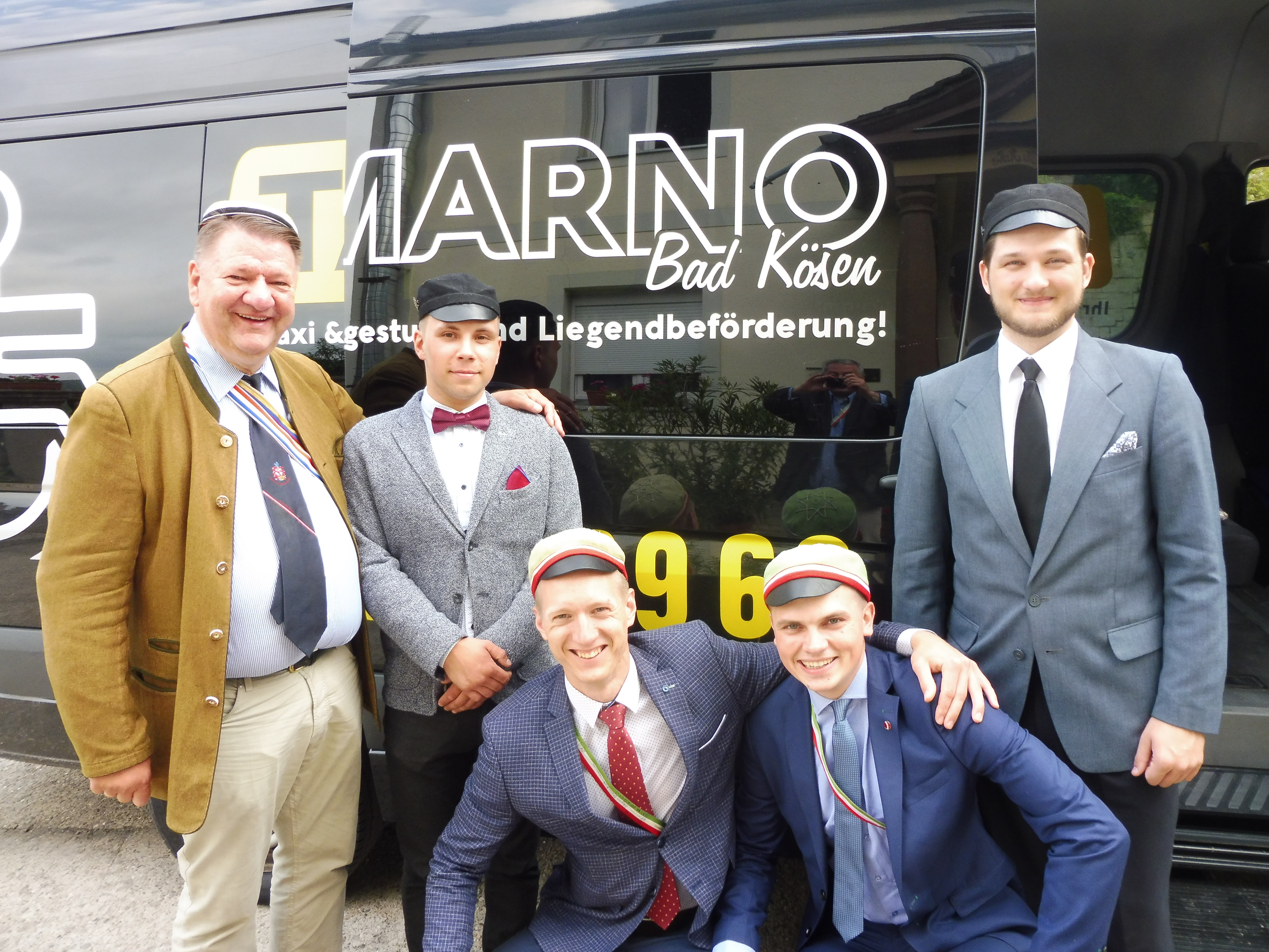 Vier Angehörige der Selonia in Bad Kösen